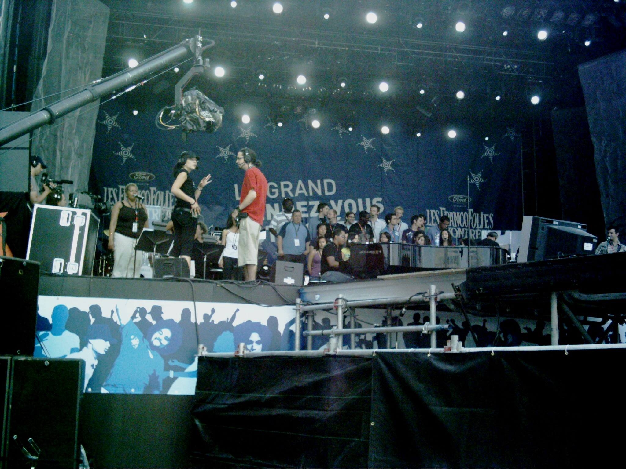 Scène extérieure installée sur la rue Sainte-Catherine à côté de la Place des Arts à Montréal. On y voit Gregory Charles au piano entouré de chanteurs, preneurs de sons et autres techniciens en préparation d'un spectacle à donner en soirée.